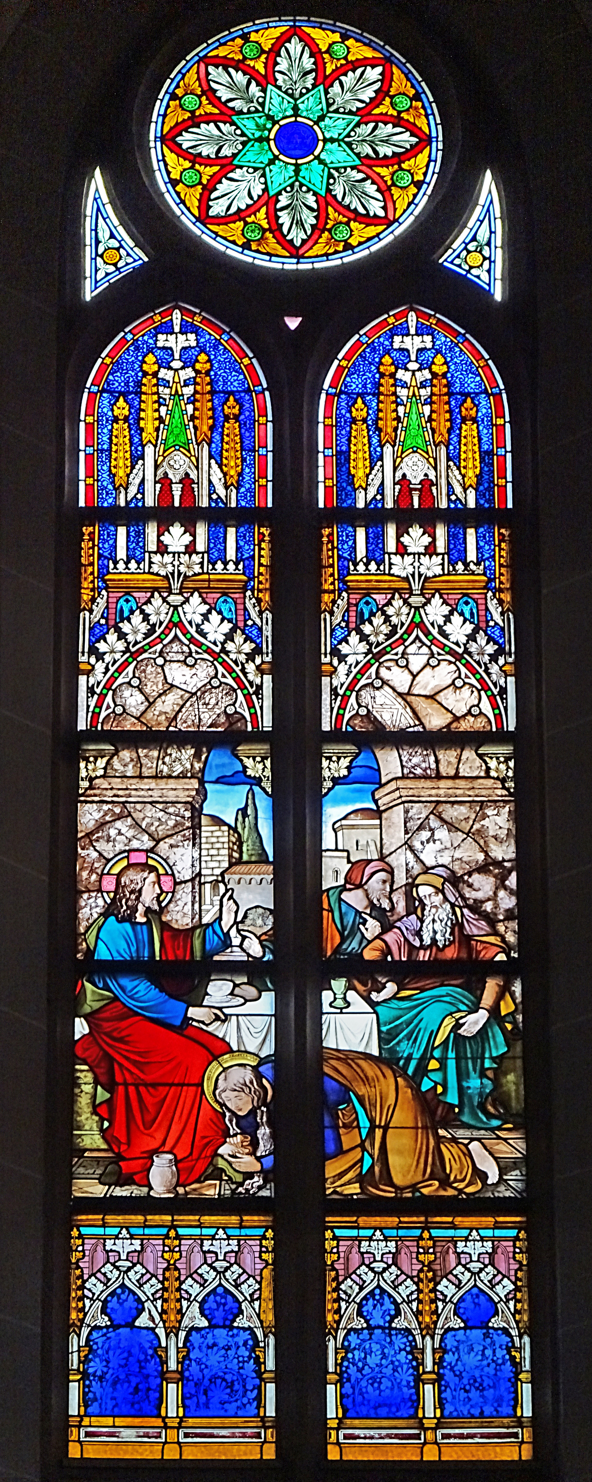 Buntglasfenster im Chor der Pfarrkirche St. Maria Magdalena (Leinefelde)